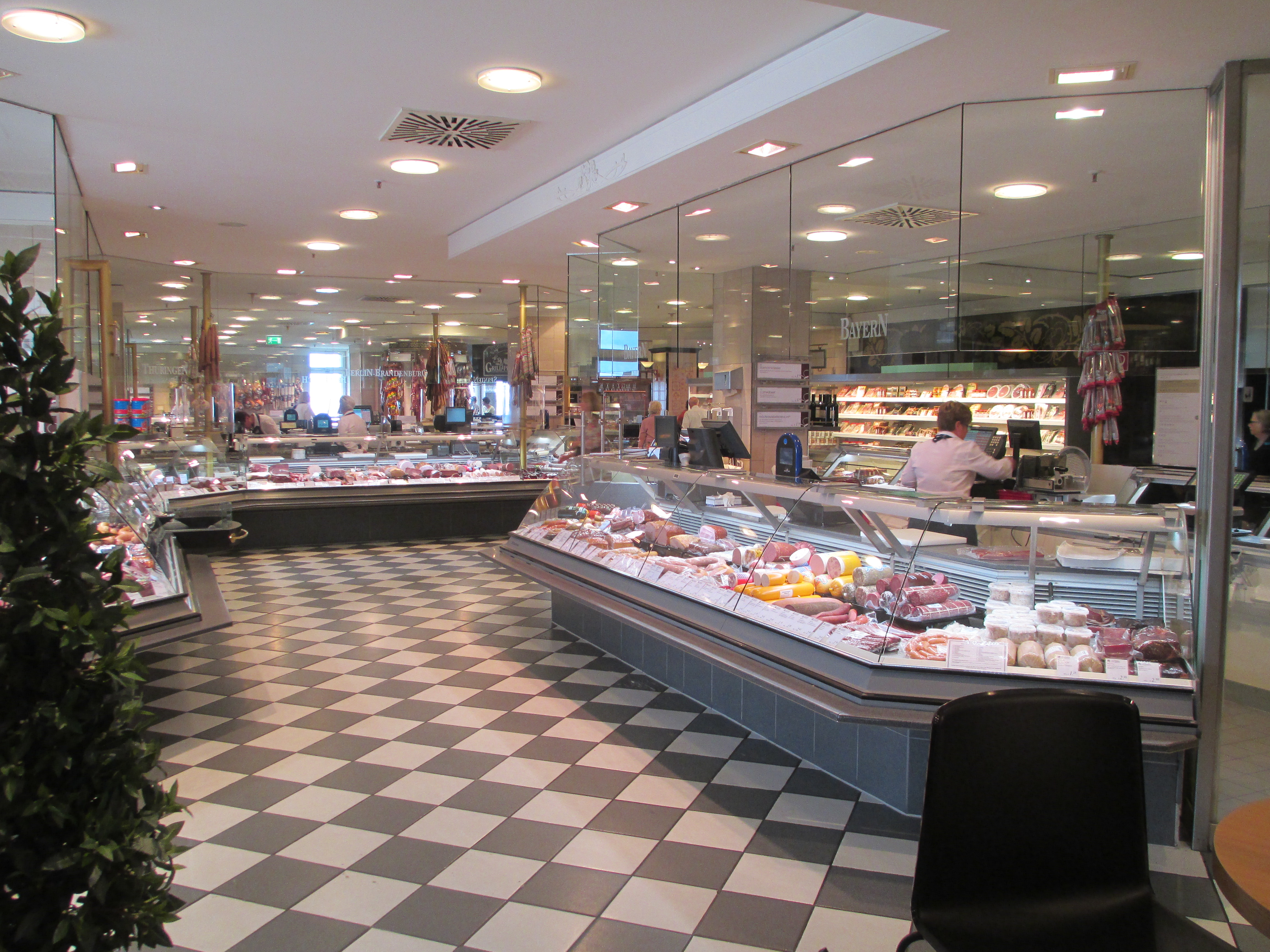 קומת המעדנייה בקה דה וה